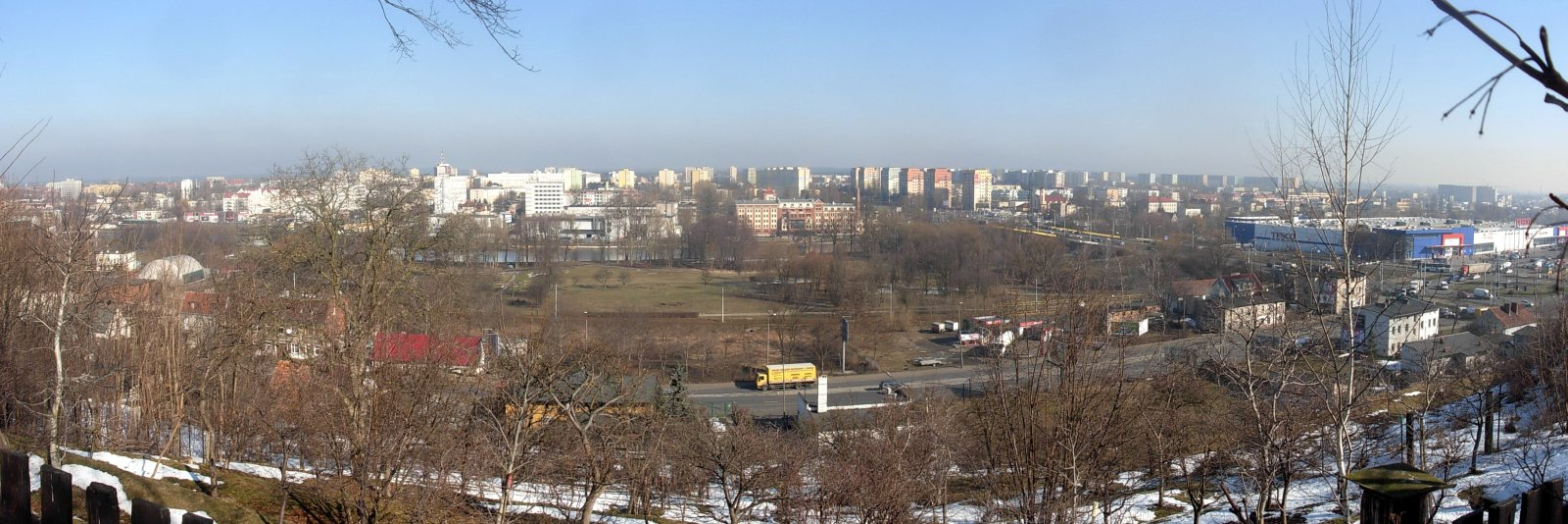 Panorama z parku na Wzgórzu Wolności w Bydgoszczy, za szpitalem im. J. Biziela